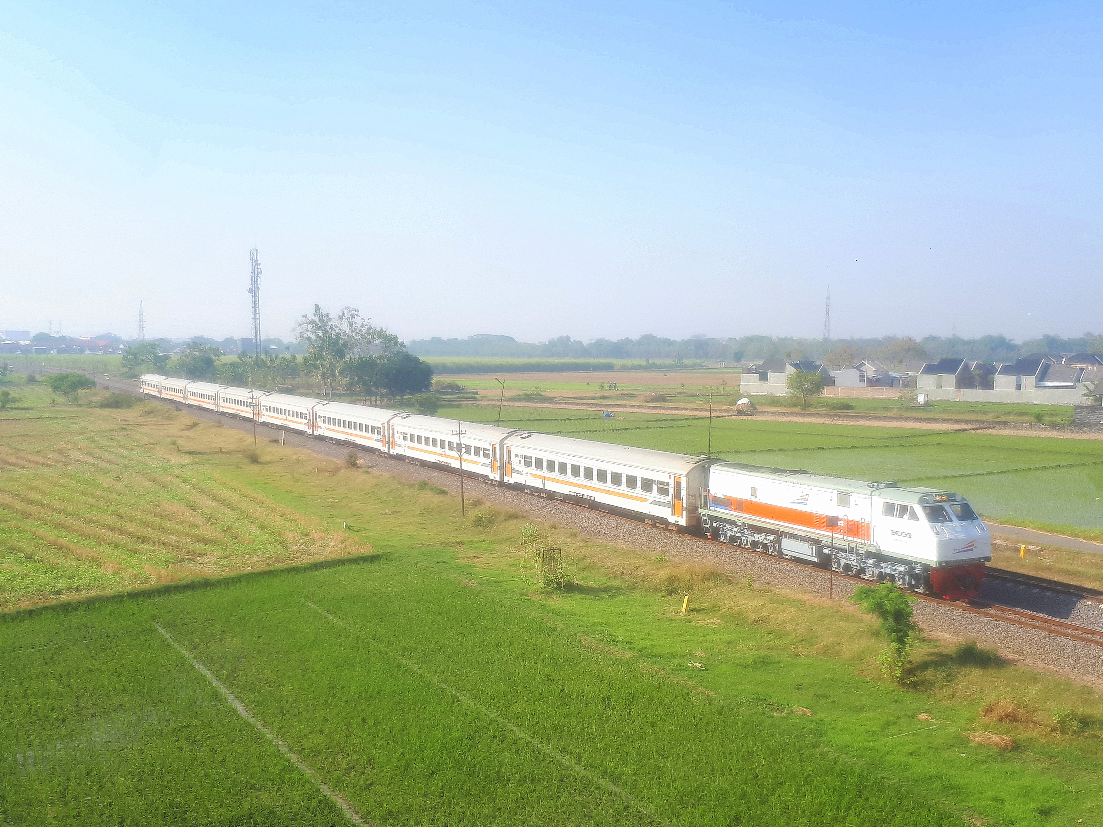 Kereta api Pasundan jurusan Bandung saat melintas di Winongo, Madiun